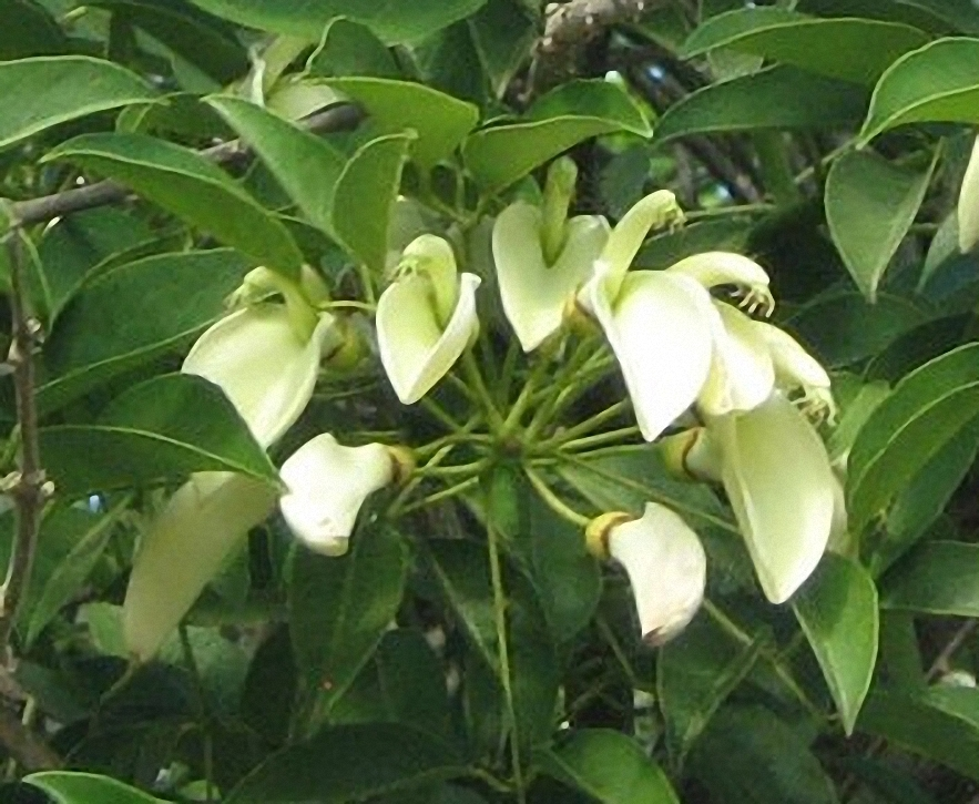 Flor de ceibo blanco